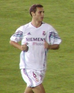 Helguera